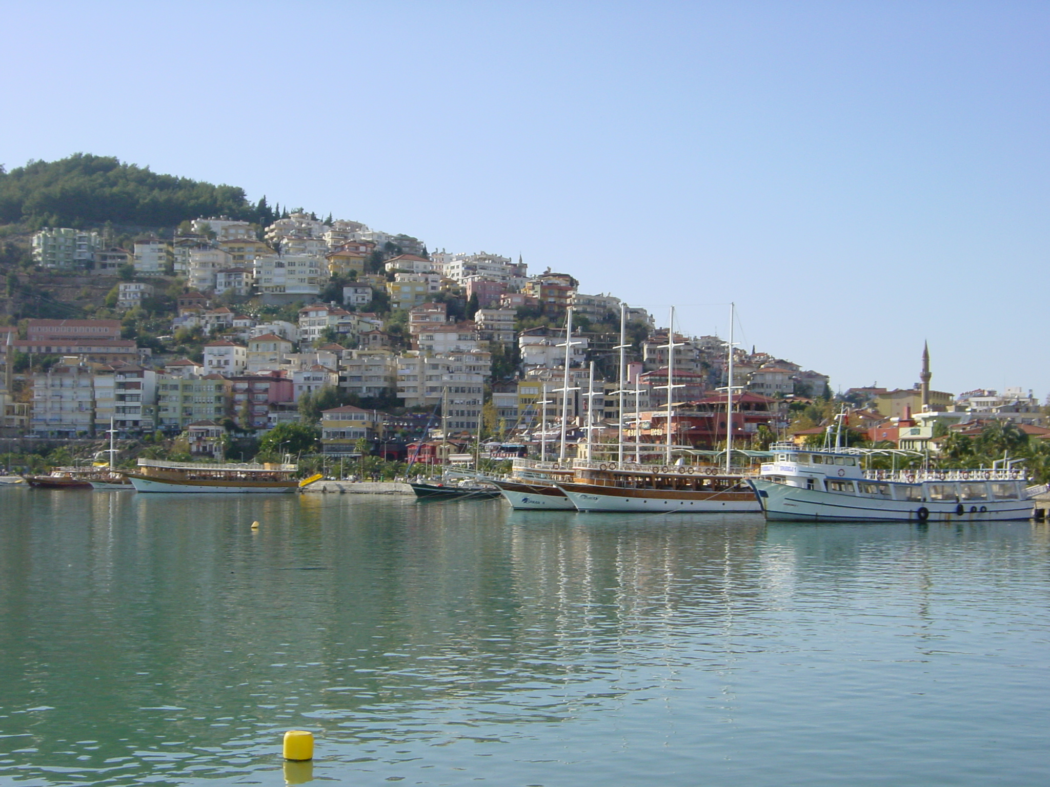 2003-12-28 01-04 T�rkei 016 Alanya